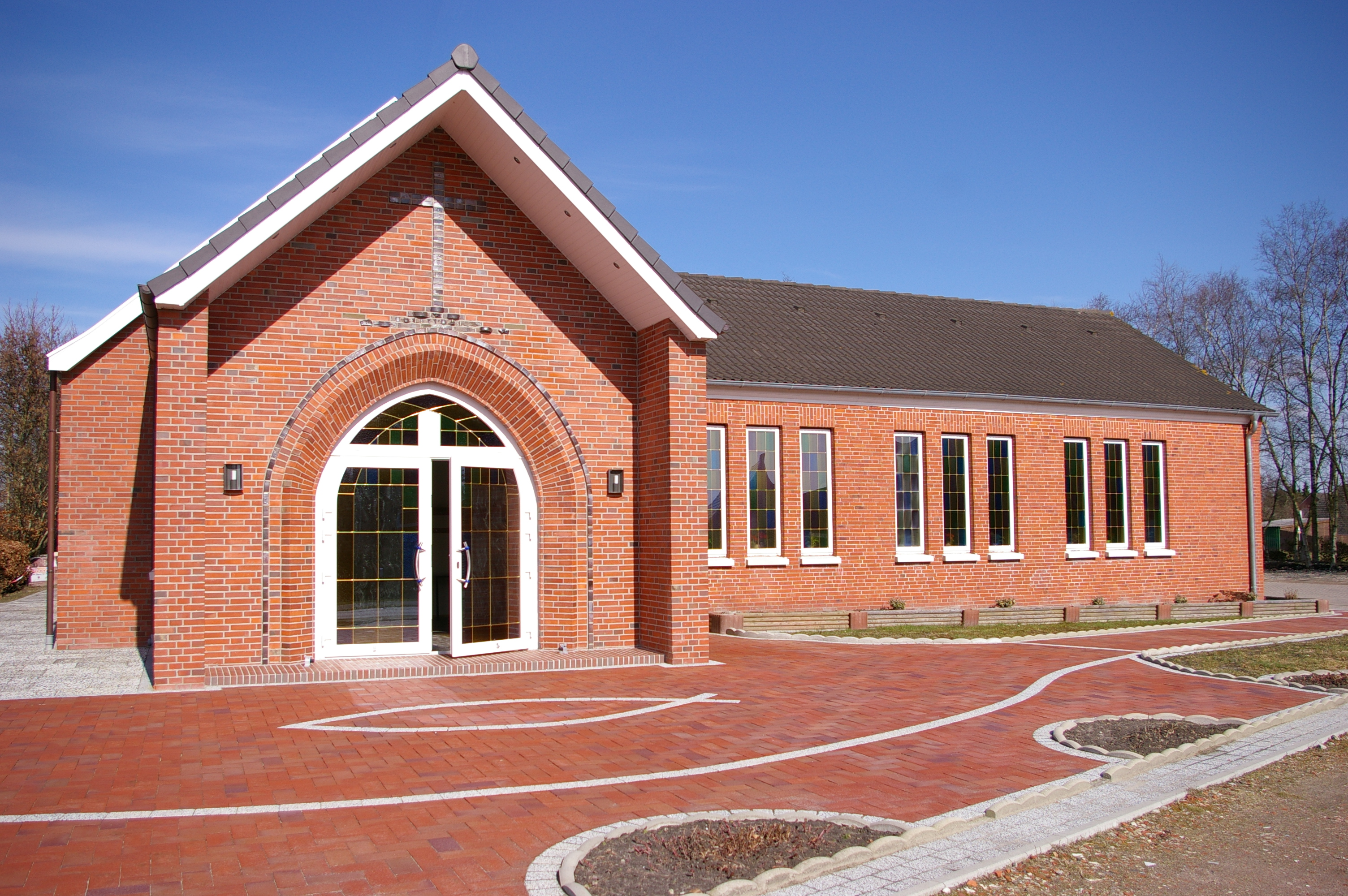 Baptistenkapelle Moorhusen vom Rüskeweg aus gesehen